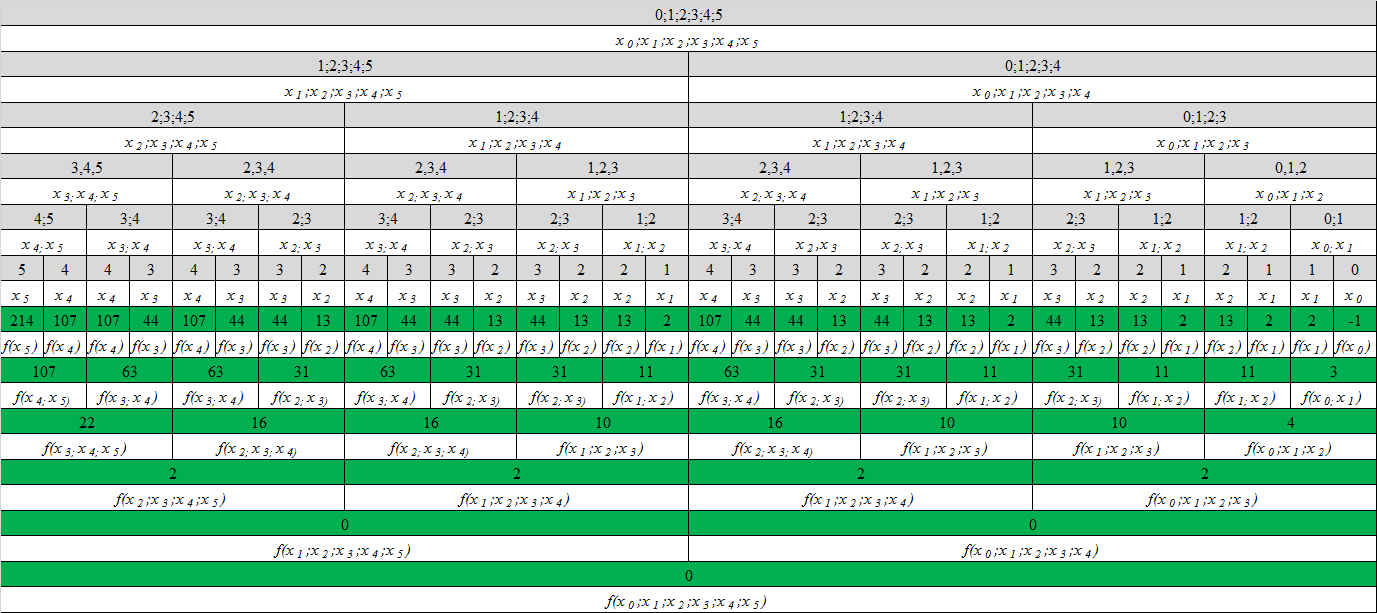 Пример для функции у = 2 х3 - 2 х2 + 3 х - 1